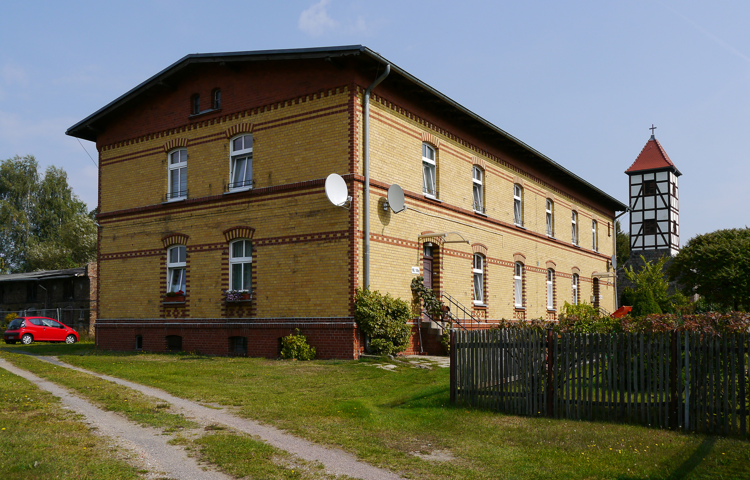 Baudenkmal: Dorfstraße 18a, Schenkenhorst, Landarbeiterhaus